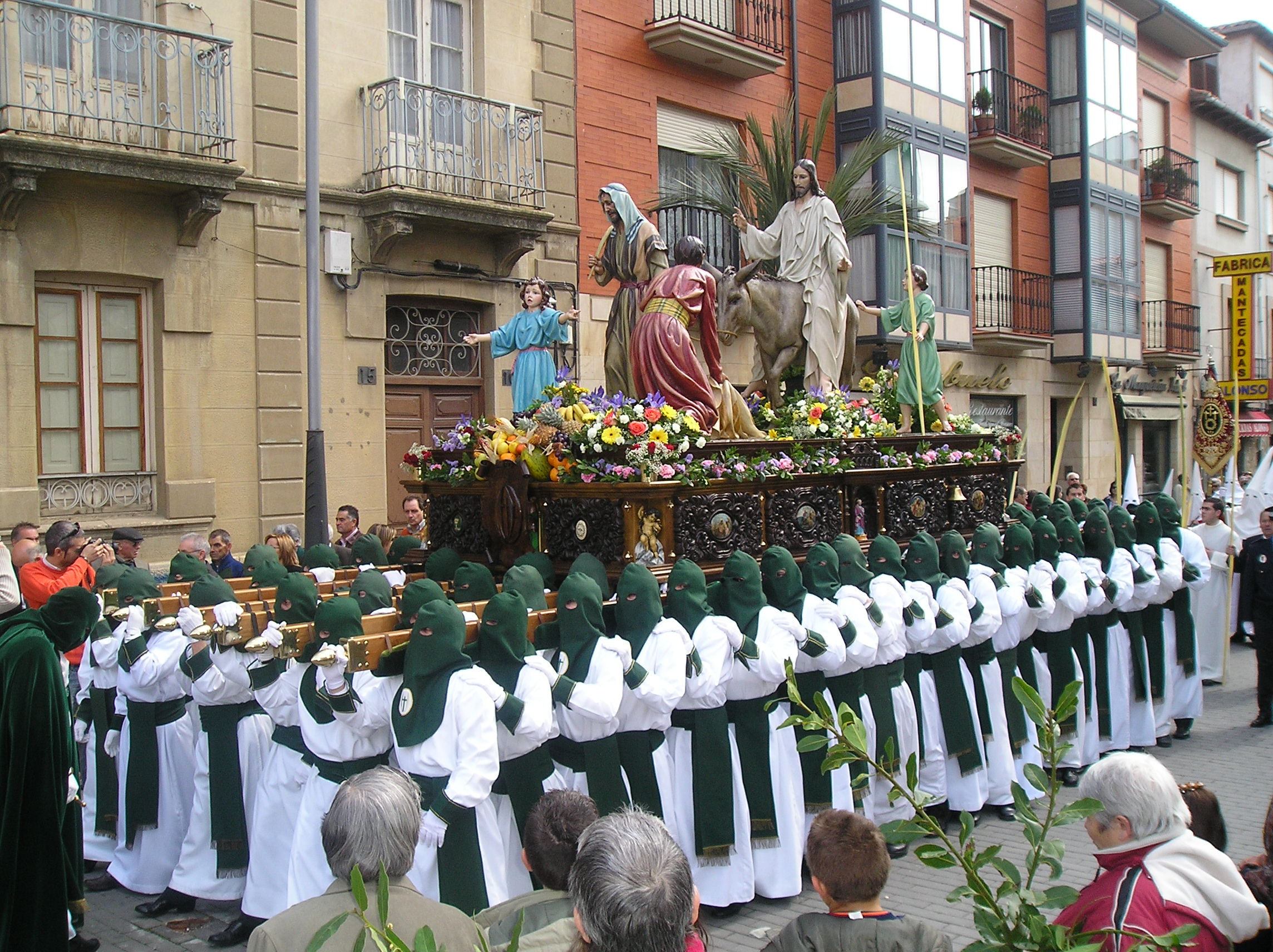 Procesión de Las Palmas, organizada por la Cofradía de la Entrada de Jesús en Jerusalén, el Domingo de Ramos en Astorga, León, España.